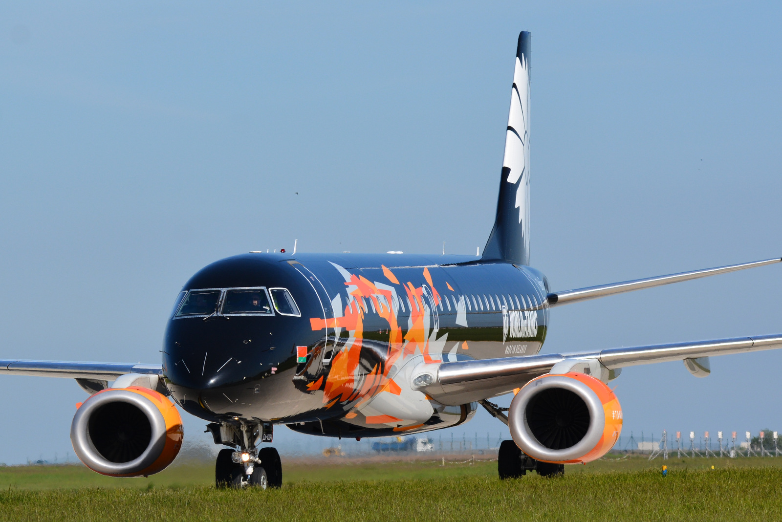 EW-400PO - Embraer ERJ-195 (LR) - Belavia